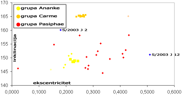 Jupiterovi retrogradni nepravilni sateliti (stanje listopad 2005) - inklinacija vs ekscentricitet